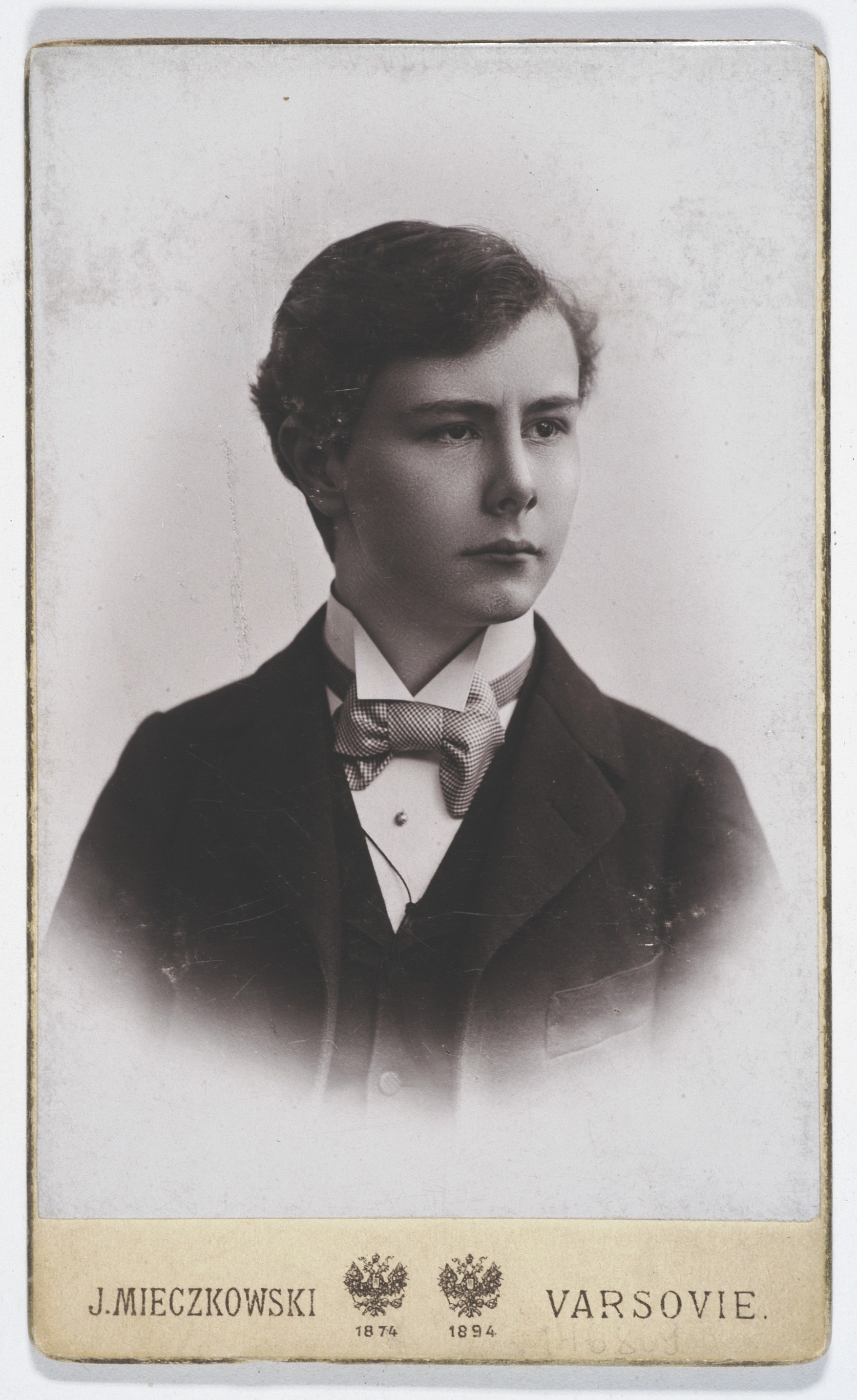 Józef Hofmann, 1895 r.